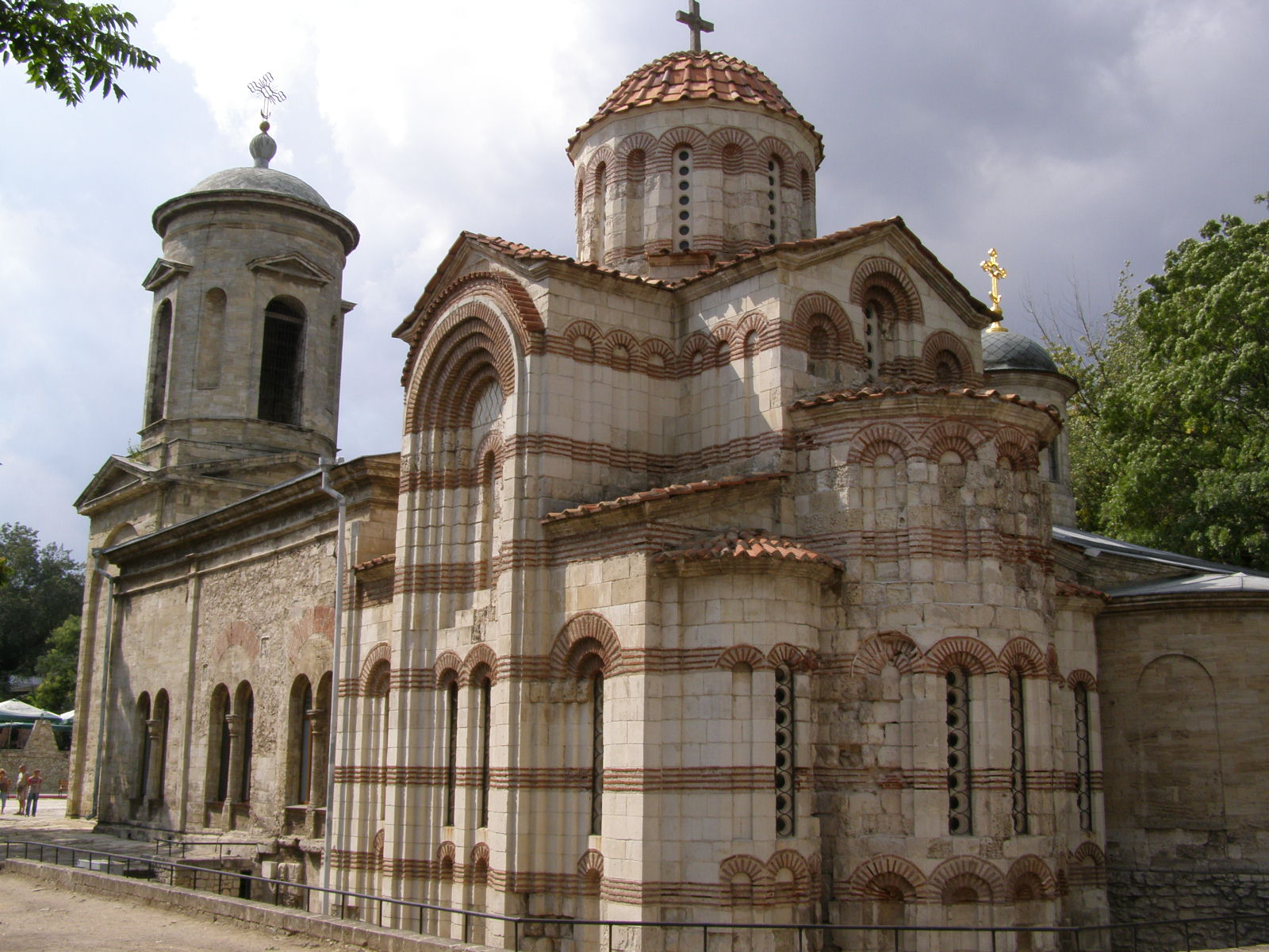 Церква Івана Предтечі в Керчі